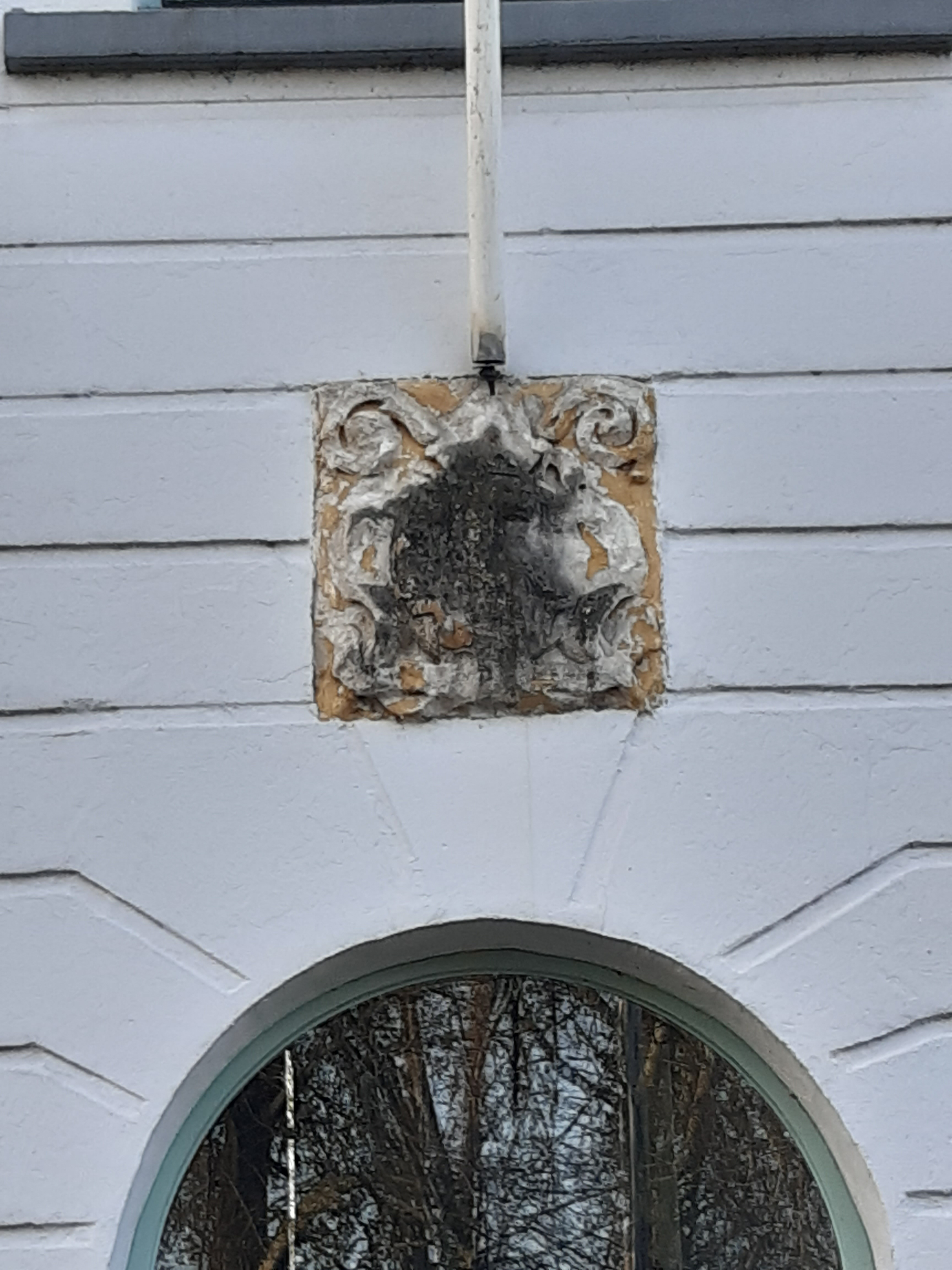 Pater Piëra, een Tongerlose abt van Spaanse afkomst (1695-1723) betrok de Pastorij nadat hij ingrijpende renovaties liet uitvoeren en een torentje in Spaanse stijl liet bouwen eind de 17de eeuw. De rondboogdeur, waar tot op heden het wapen van Prelaat Piëra boven te zien is, is daar nog één van. Centraal bij de heropbouw stond het grote en comfortabele woonhuis met 28 slaapplaatsen. Onder de toegangspoort bouwde de toenmalige pastoor een kapel die plaats bood aan 130 mensen. Muurankers verwijzen naar het jaar 1699.